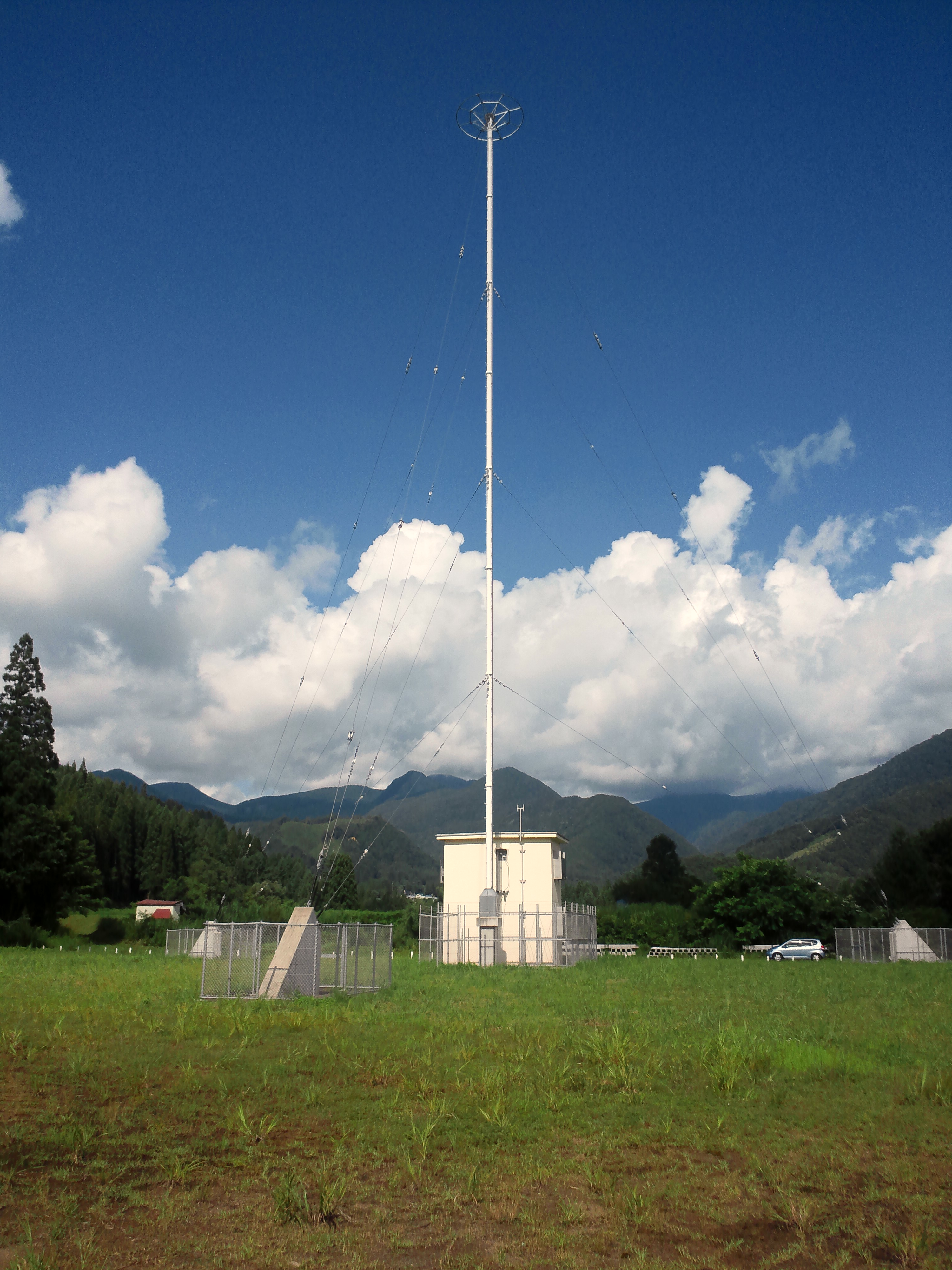 ABS東成瀬ラジオ中継所１